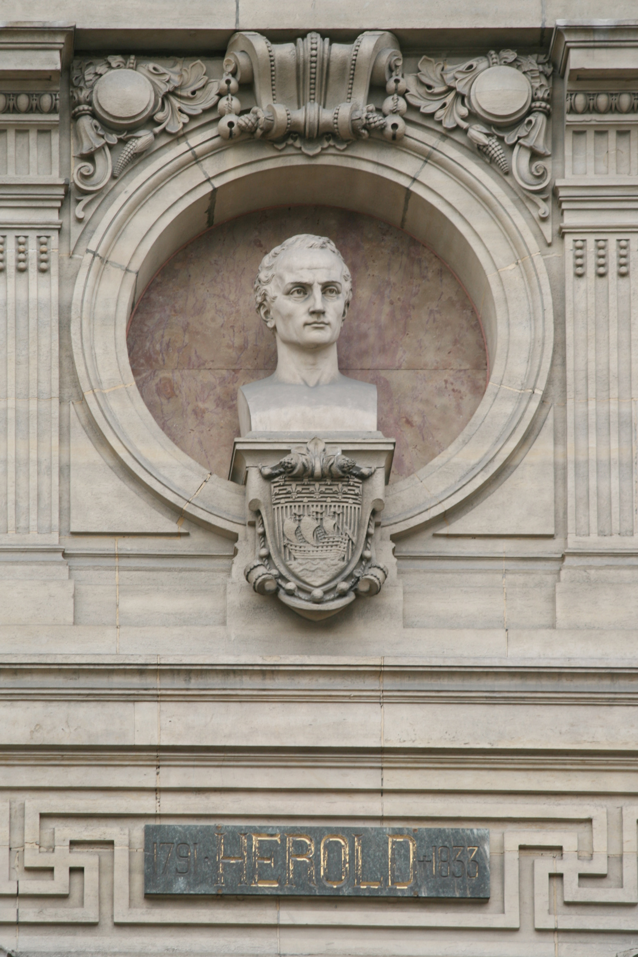 Statue de Ferdinand Hérold sur l'opéra Garnier